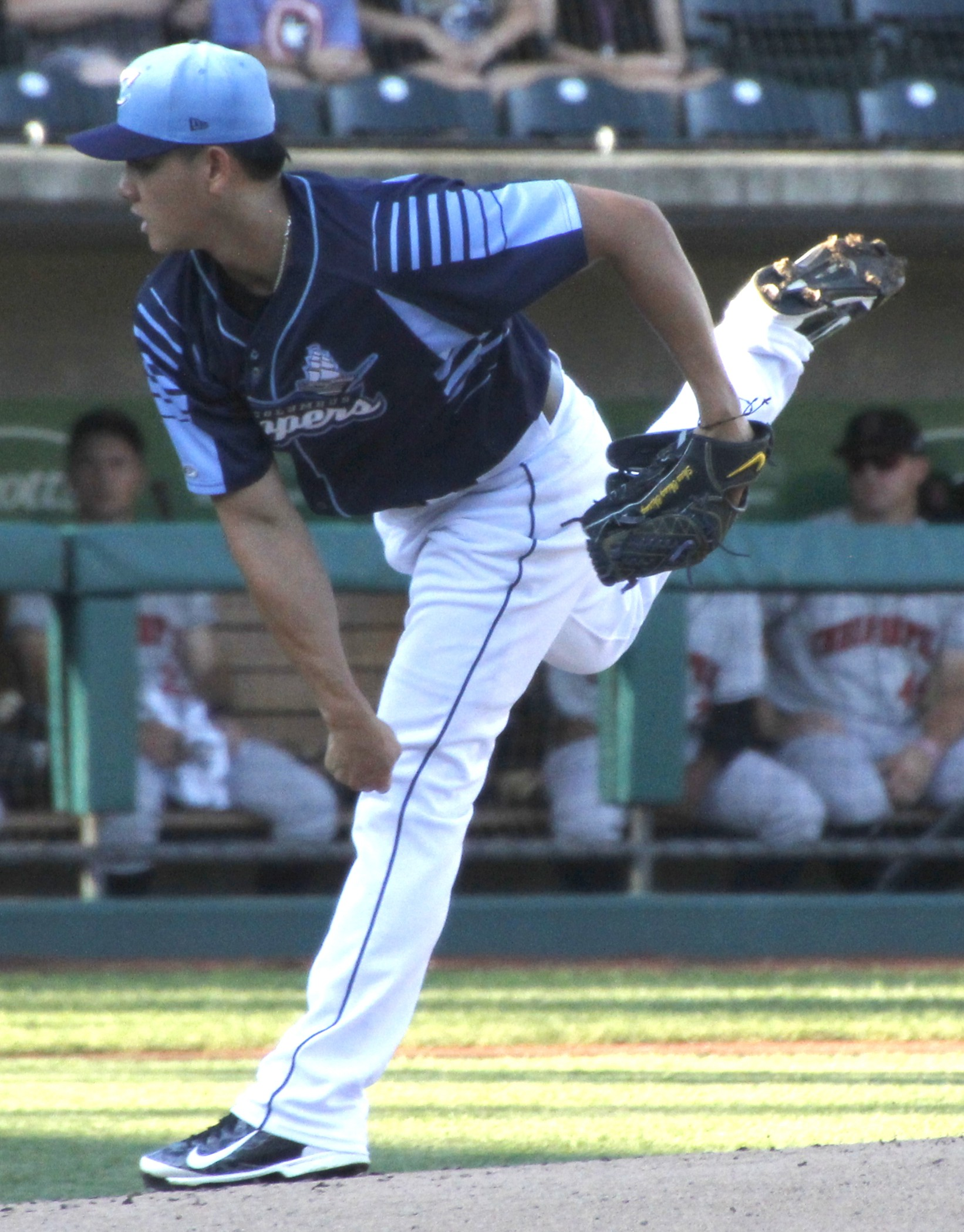 Shao-Ching Chiang 20180628